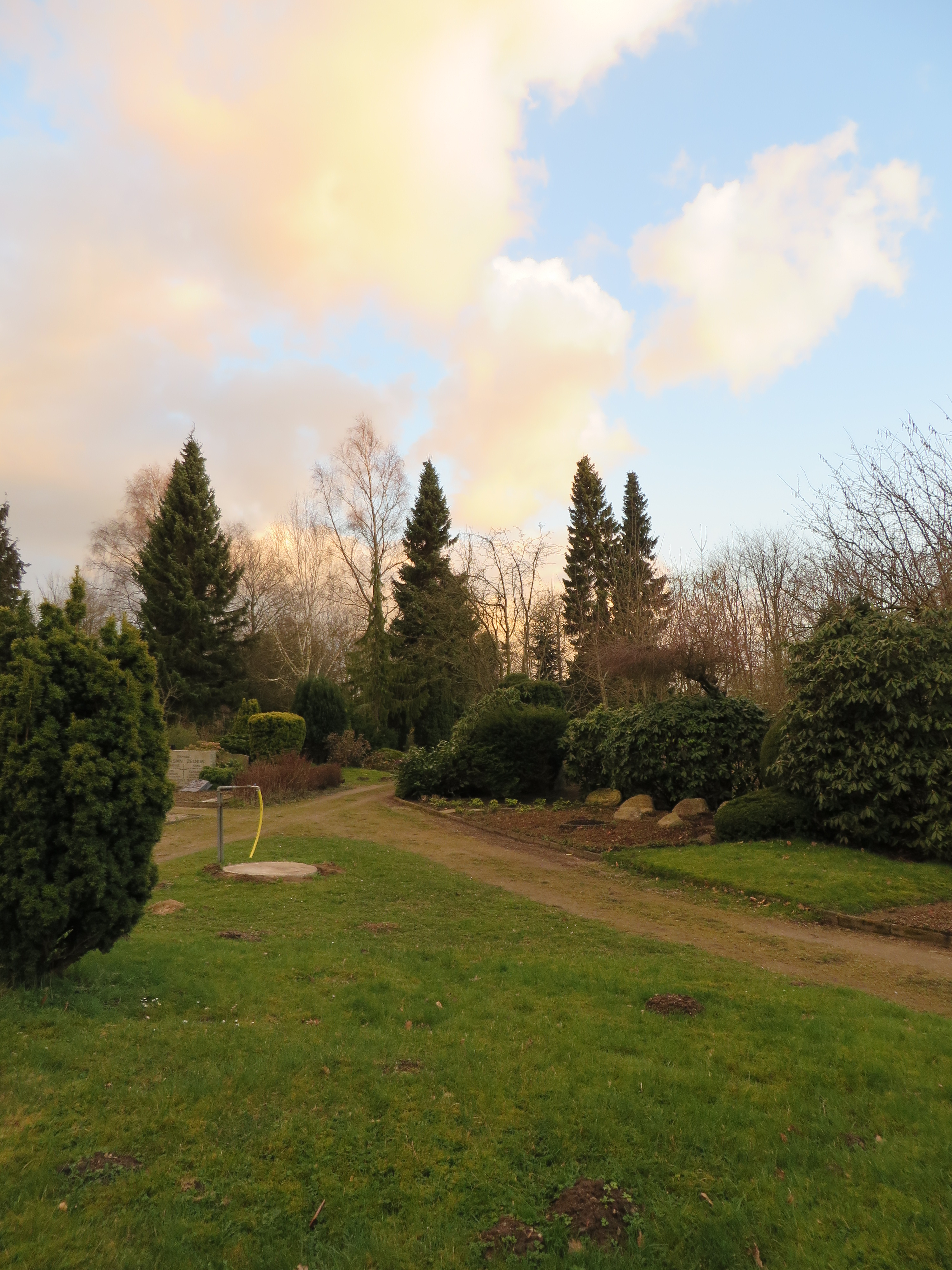 Friedhof Adelby, Gelände, Bild 001